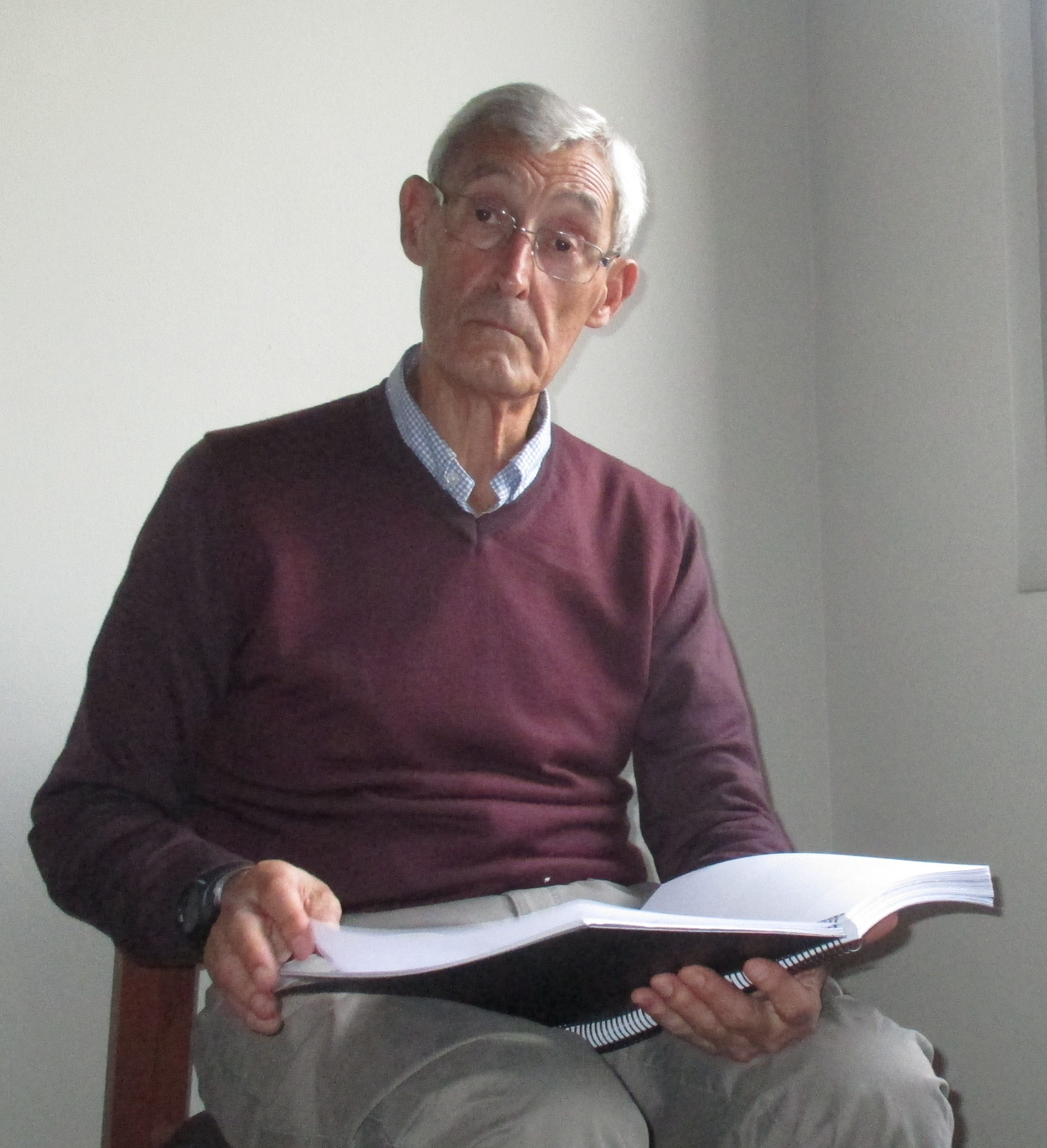 Ignacio Javier Espinosa Zarrabe, Zornotzako "Alegria Club"eko Espeleologia Taldeko buru izandakoa.